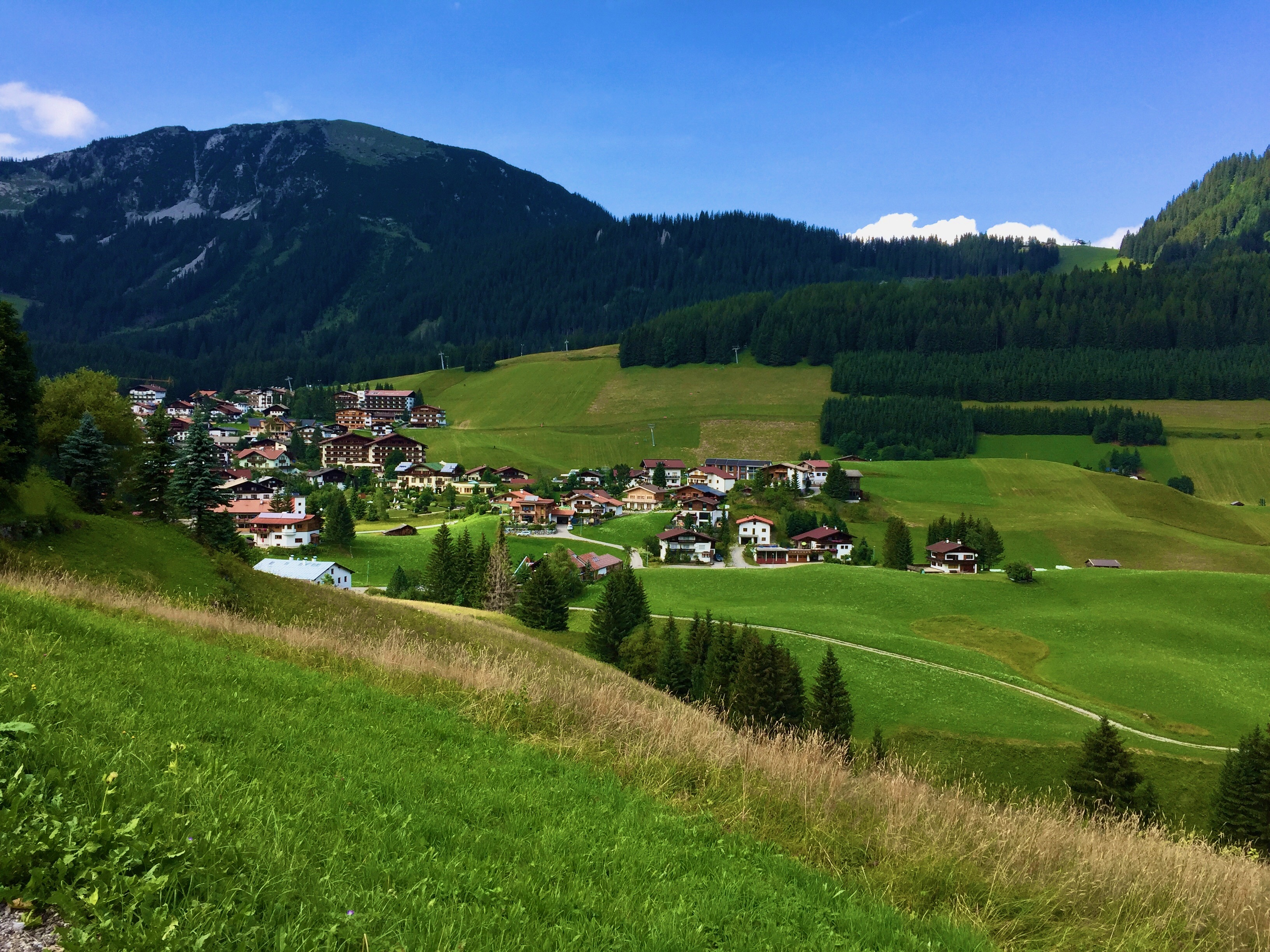 Berwang August 2019